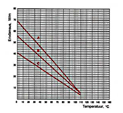 Graafikud